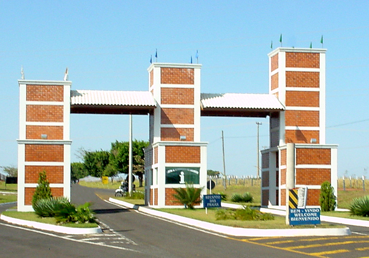 Portal da Cidade de Buritama